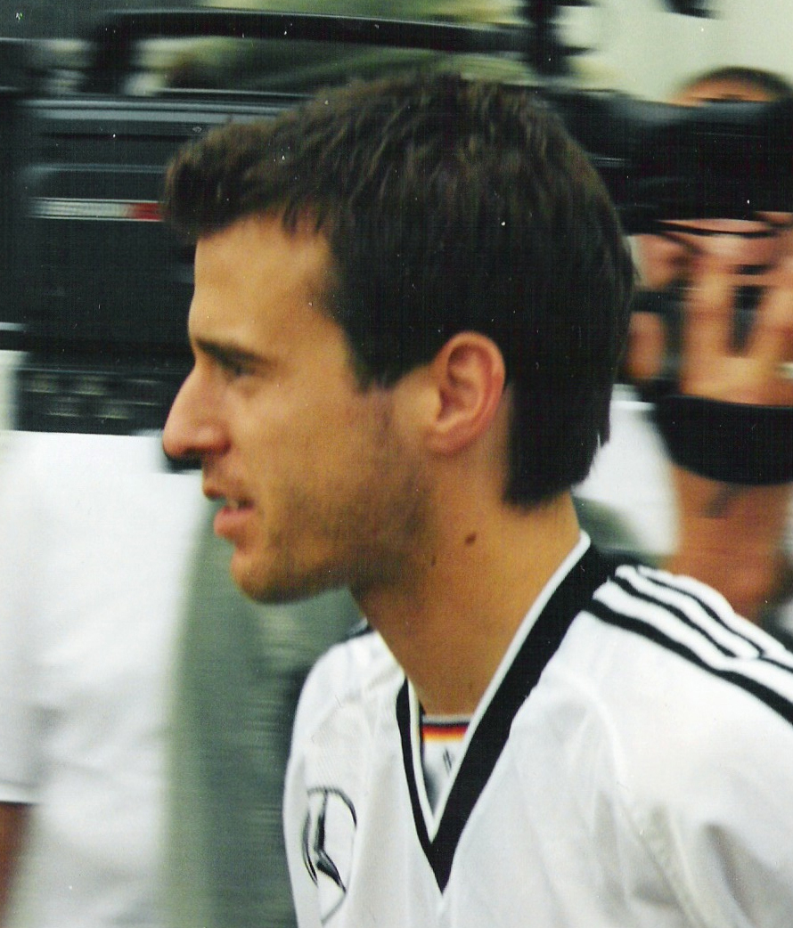 Mehmet Scholl bei einem Training der Nationalmannschaft bei Bonn